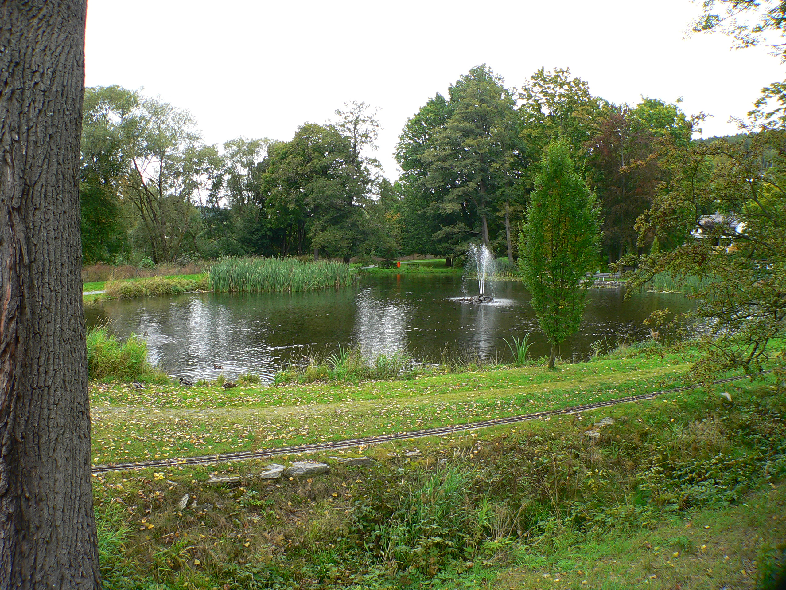 Schlosspark in Naila-Froschgrün, Bayern, Regierungsbezirk Oberfranken, Landkreis Hof